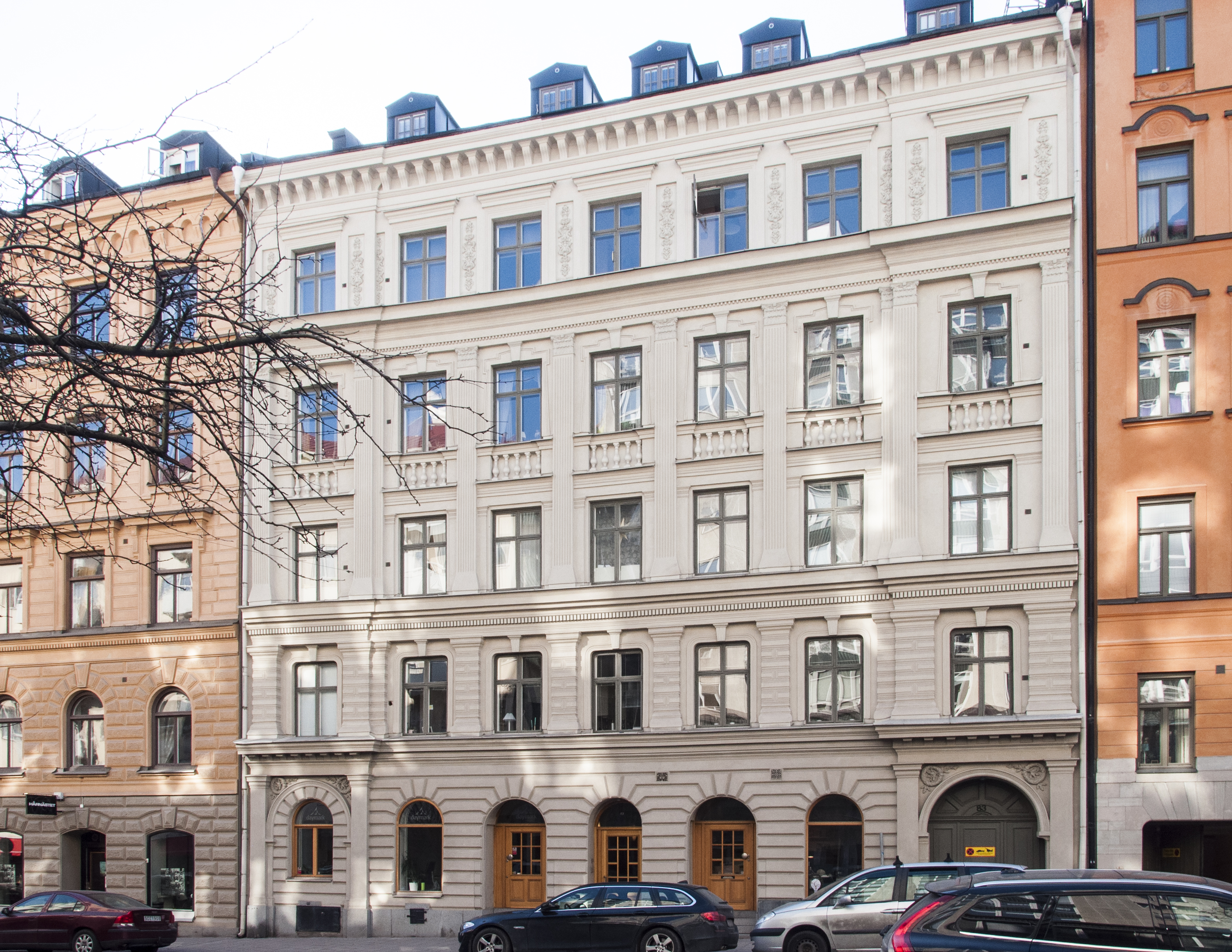 Killingen 20, Döbelnsgatan 83, Nybyggnadsår 1884 - 1885, J. A. Dahlgren (Byggherre) Johan Arvid Vallin (Arkitekt) O. A. Johnsson (Byggherre) O. A. Johnsson (Byggmästare)